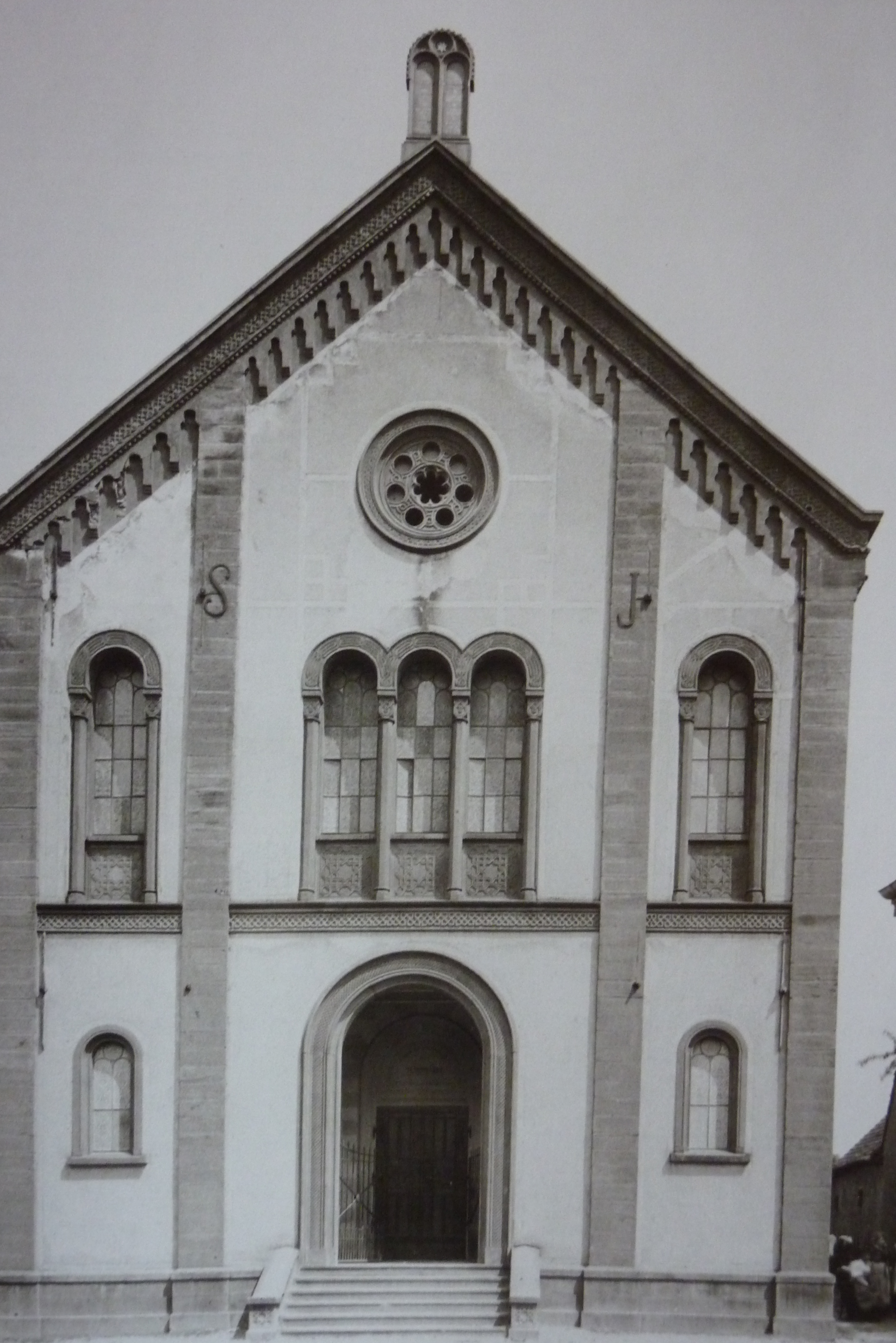 Synagoge in Ihringen, Architekt Georg Jakob Schneider, abgerissen